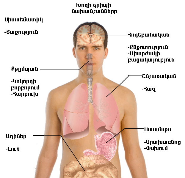 Խոզի գրիպի նախանշանները